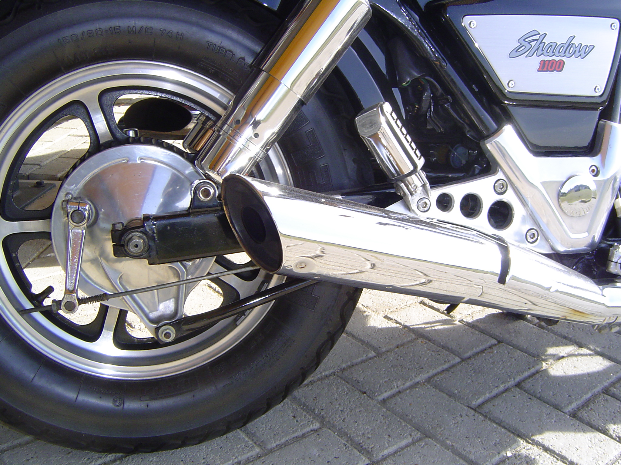 Een baloney is een schuin afgesneden uitlaatdemper van een motorfiets, vaak toegepast op customs. Deze doet aan een schuin afgesneden worst (“baloney”) denken.